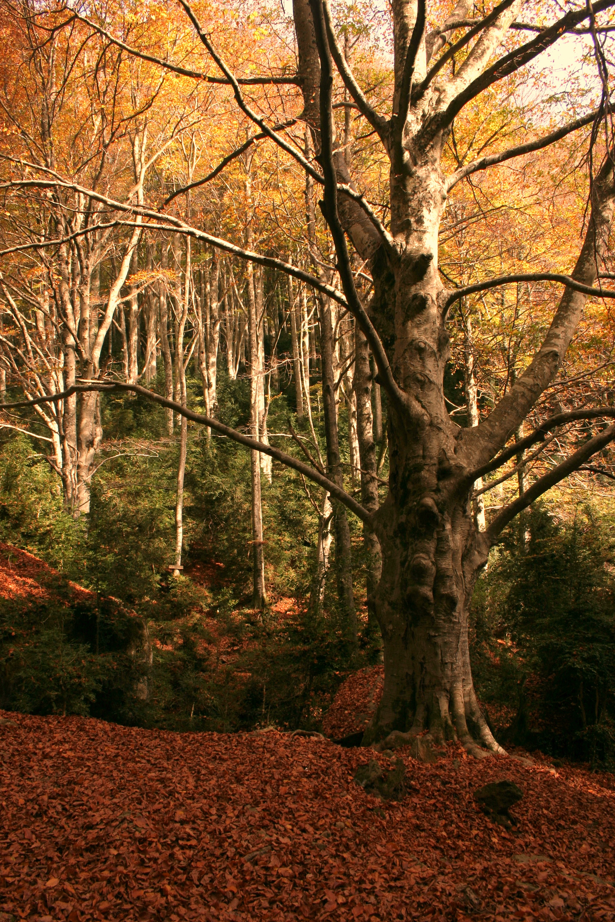 Fageda de la Grevolosa (Sant Pere de Torelló) This is a a photo of a protected or outstanding tree in Catalonia, Spain, with id: MA-24.233.01